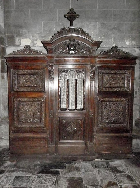 Confessionnal classé de la cathédrale Saint-Samson de Dol-de-Bretagne (35).